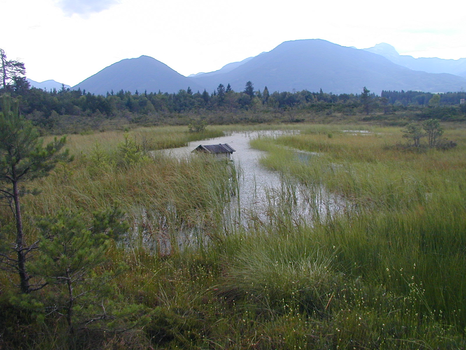 Blick über den Hubersee - Im Hintergrund die Sternthaler-Filze und das Litzldorfer-Tal mit dem Sulzberg (1120m) links und auf der rechten Seite der Farrenpoint (1272m), außerdem sind noch die Gebirgszüge des Wendelsteins (1834m) zu erkennen.